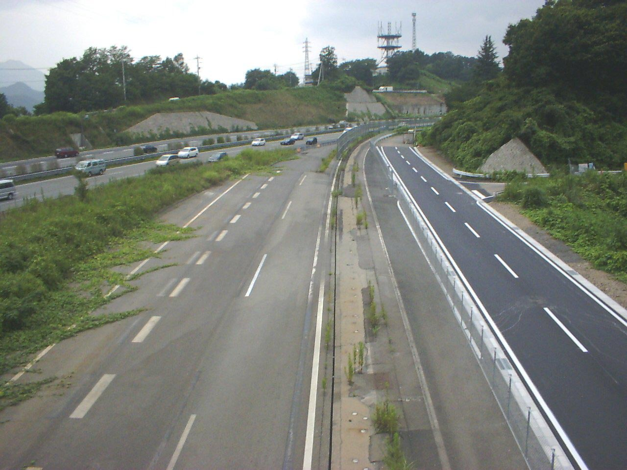 談合坂付近、高速道路付け替え部